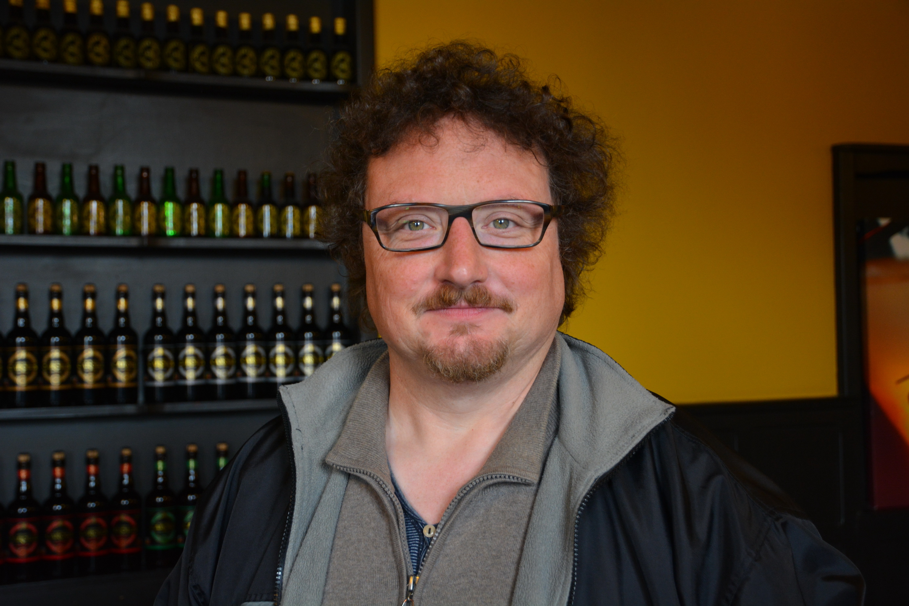 Frank Vaganée tijdens de voorstelling van de Mechelse Muziekmarathon 2014 ten voordele van Kom op tegen Kanker.